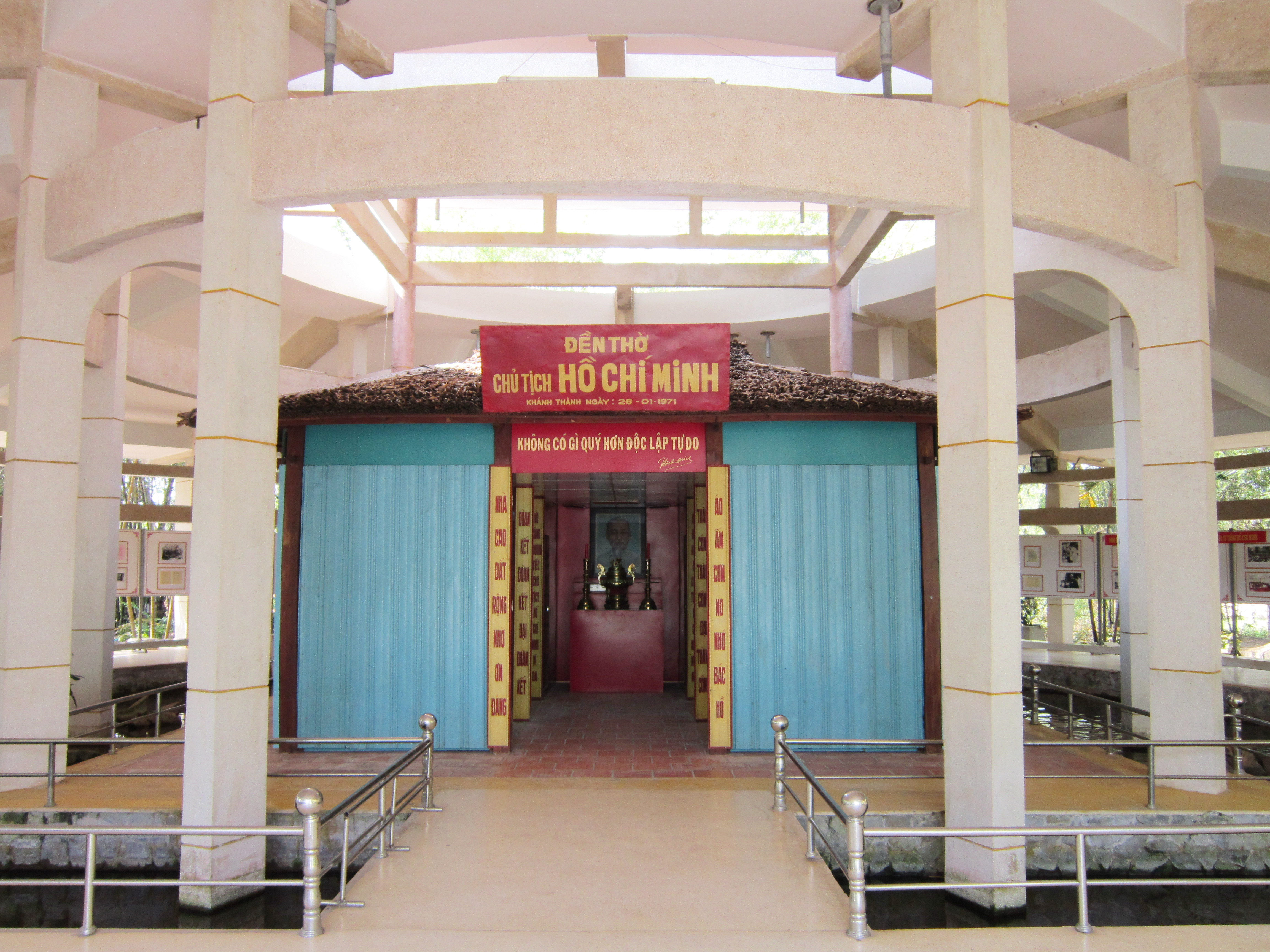 Đền thờ Chủ tịch Hồ Chí Minh ở xã Long Đức, thành phố Trà Vinh (tỉnh Trà Vinh, Việt Nam).